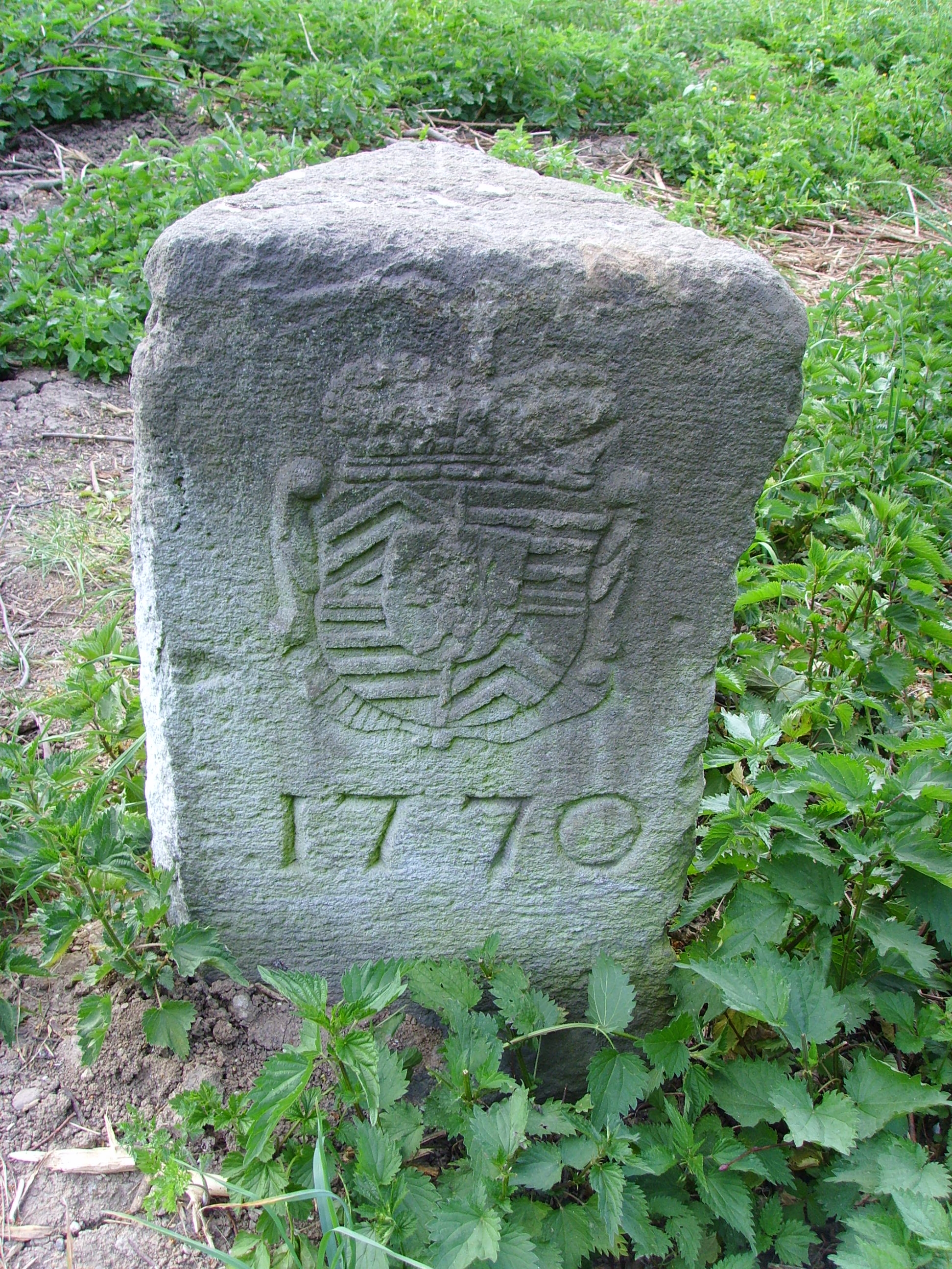 Frankfurt am Main, Niddapark, gemeinsamer Grenzstein von 1770 für die Orte Hausen, Praunheim und Ginnheim / Boundary stone (1770) between 3 former independent villages (today outskirts of Frankfurt)